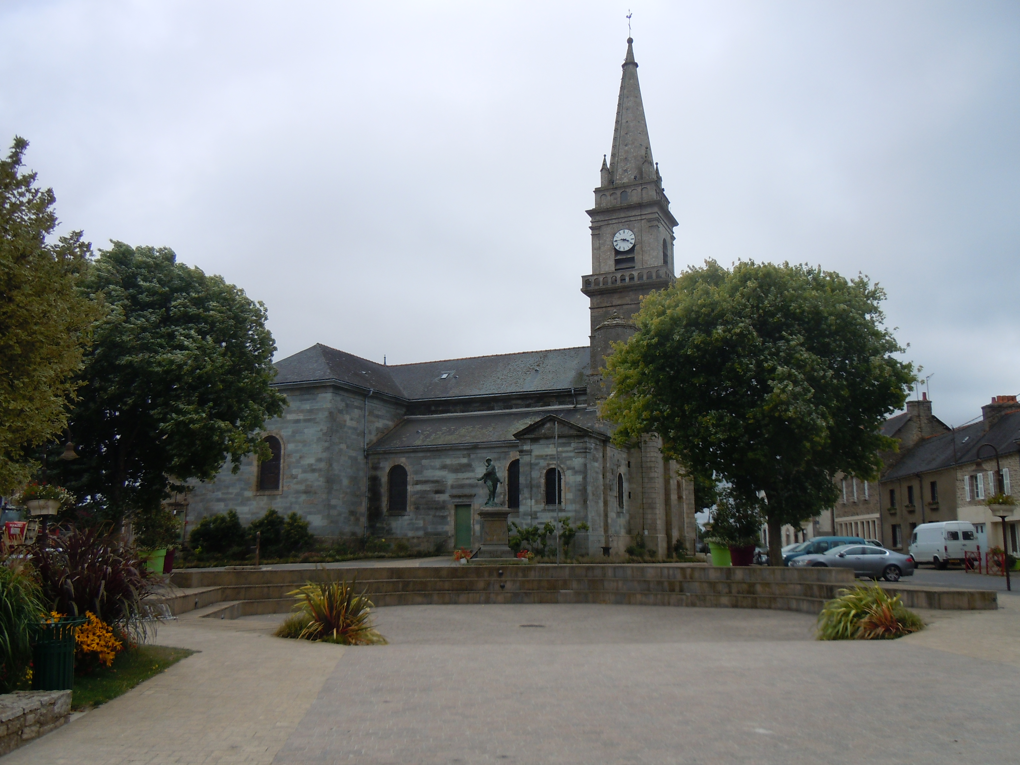 l'église paroissiale de Cléguérec (Morbihan) dédiée à Saint-Guérec .